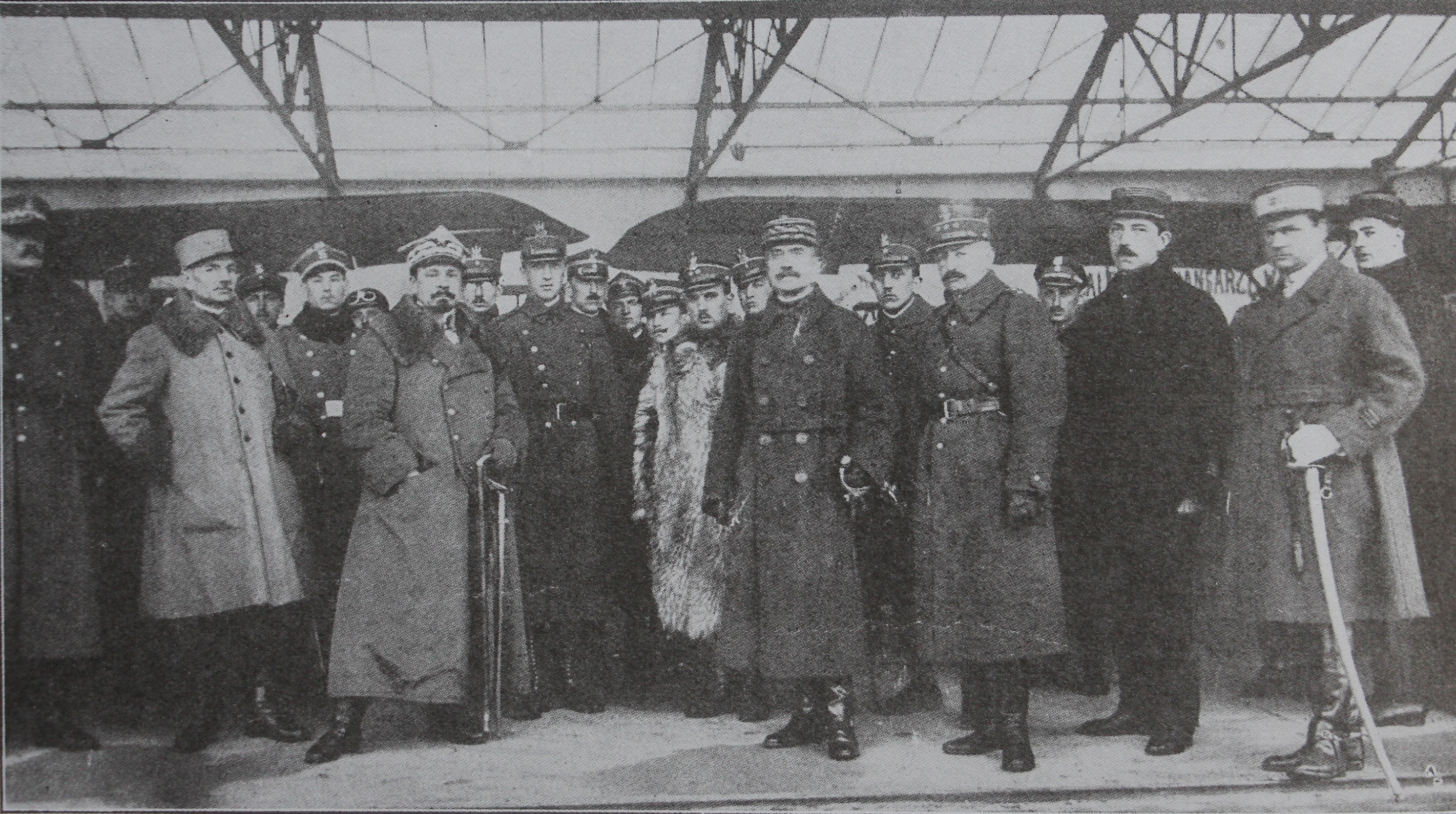 Zajęcie lotniska w Toruniu; styczeń 1920. Gen. Józef Haller i gen. Paul Henrys ze sztabami. Lotnicy: rtm. Antoni Buckiewicz, por. Tytus Karpiński, por. Wiktor Szandorowski, ppor. Wacław Makowski i inni.